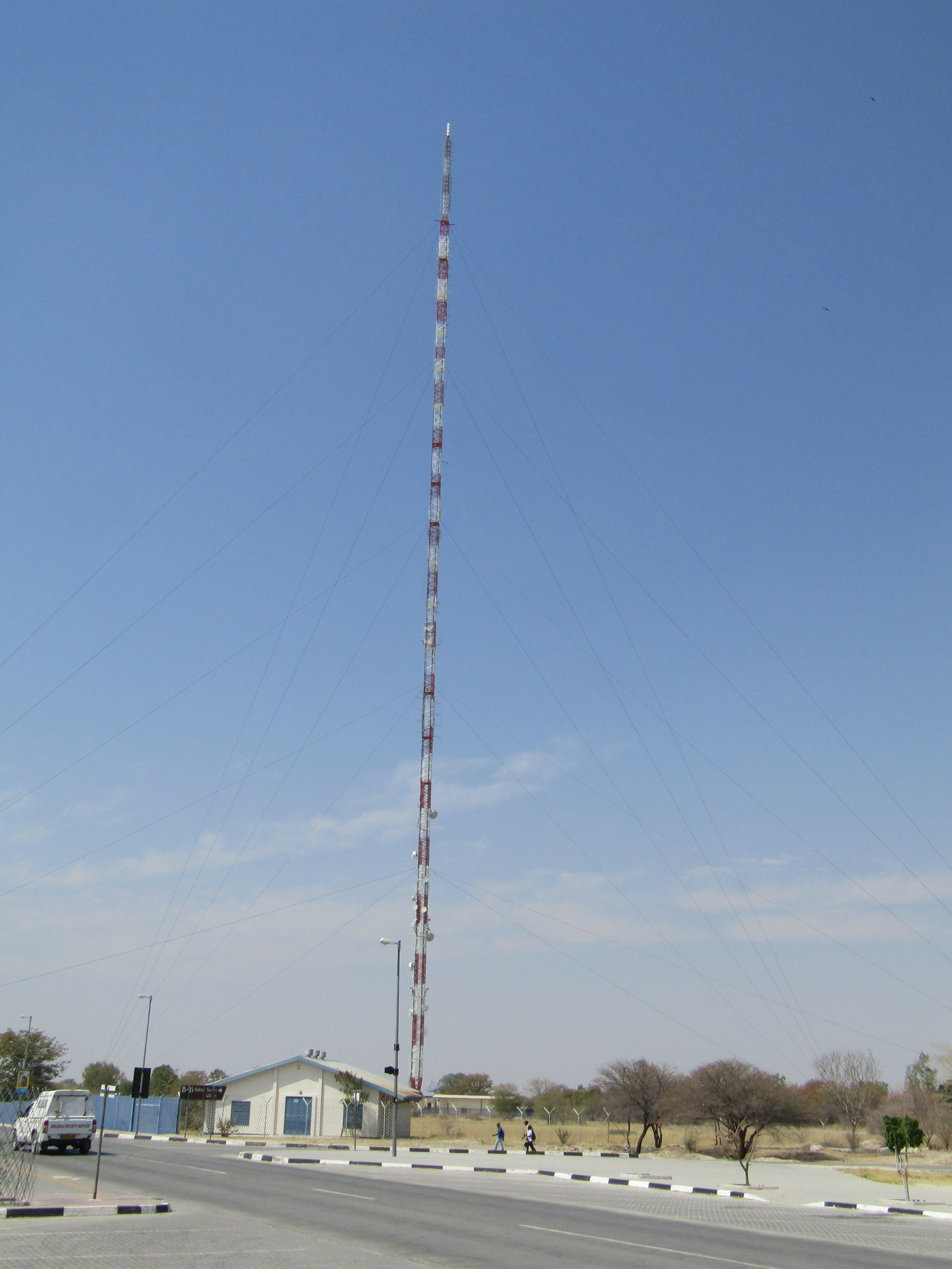 275 m m high